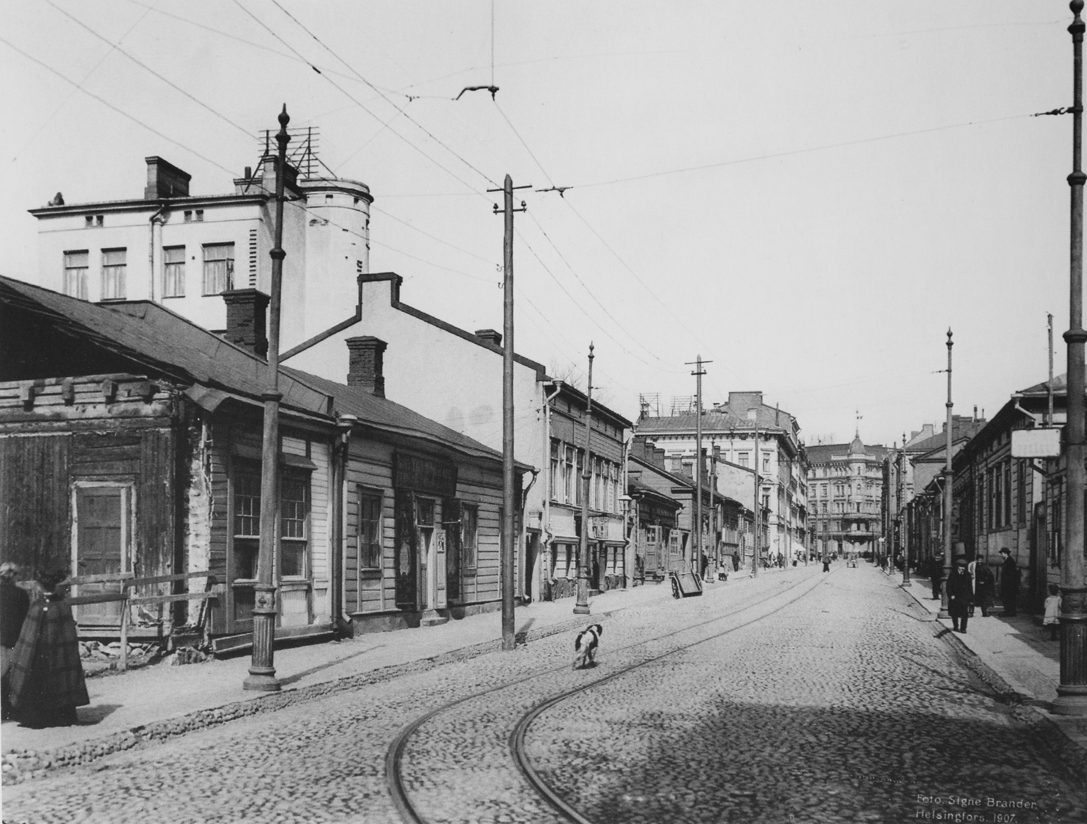 Iso Roobertinkatua Fredrikinkadulta nähtynä vuonna 1907.